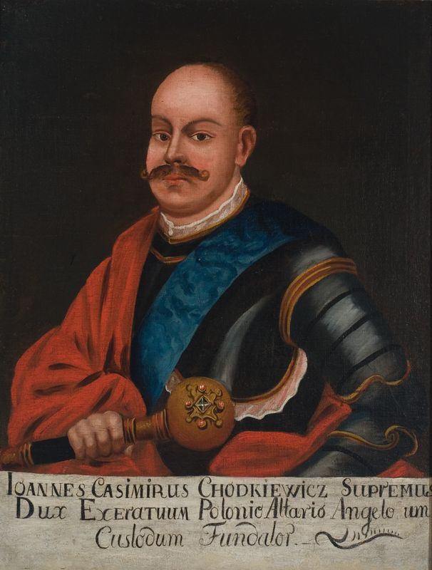 Беларуская (тарашкевіца): Партрэт Яна Казімера Хадкевіча (Jan Kazimier Chadkievič)